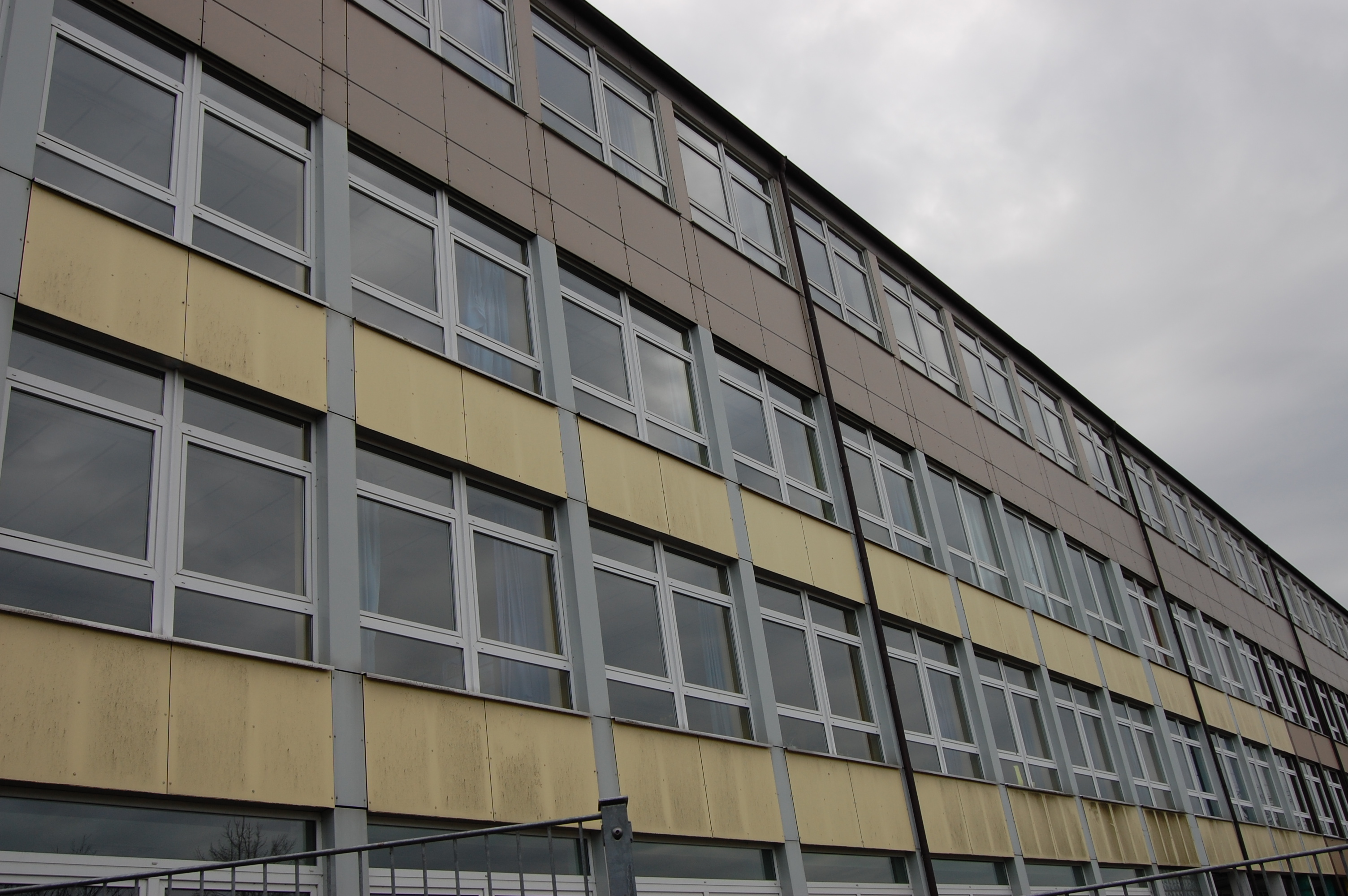 AFG Halver: Die Rückseite des Haupttraktes mit den Klassenzimmern